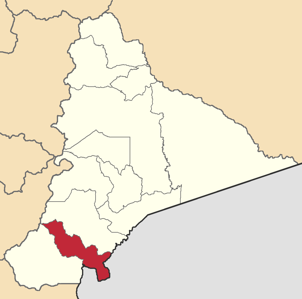 Mapa localizador del cantón en Morona-Santiago, Ecuador